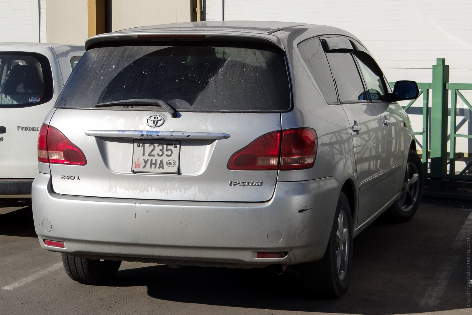 Региональная принадлежность номерного знака (УН) — г. Улан-Батор (Улаанбаатар хот)